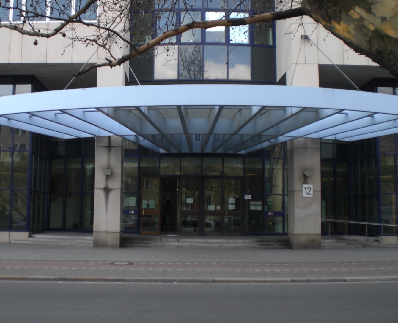 Kriminalpolizei (Landeskriminalamt - LKA) Berlin, Eingangsbereich Tempelhofer Damm 12, Aufnahme vom Mittelstreifen